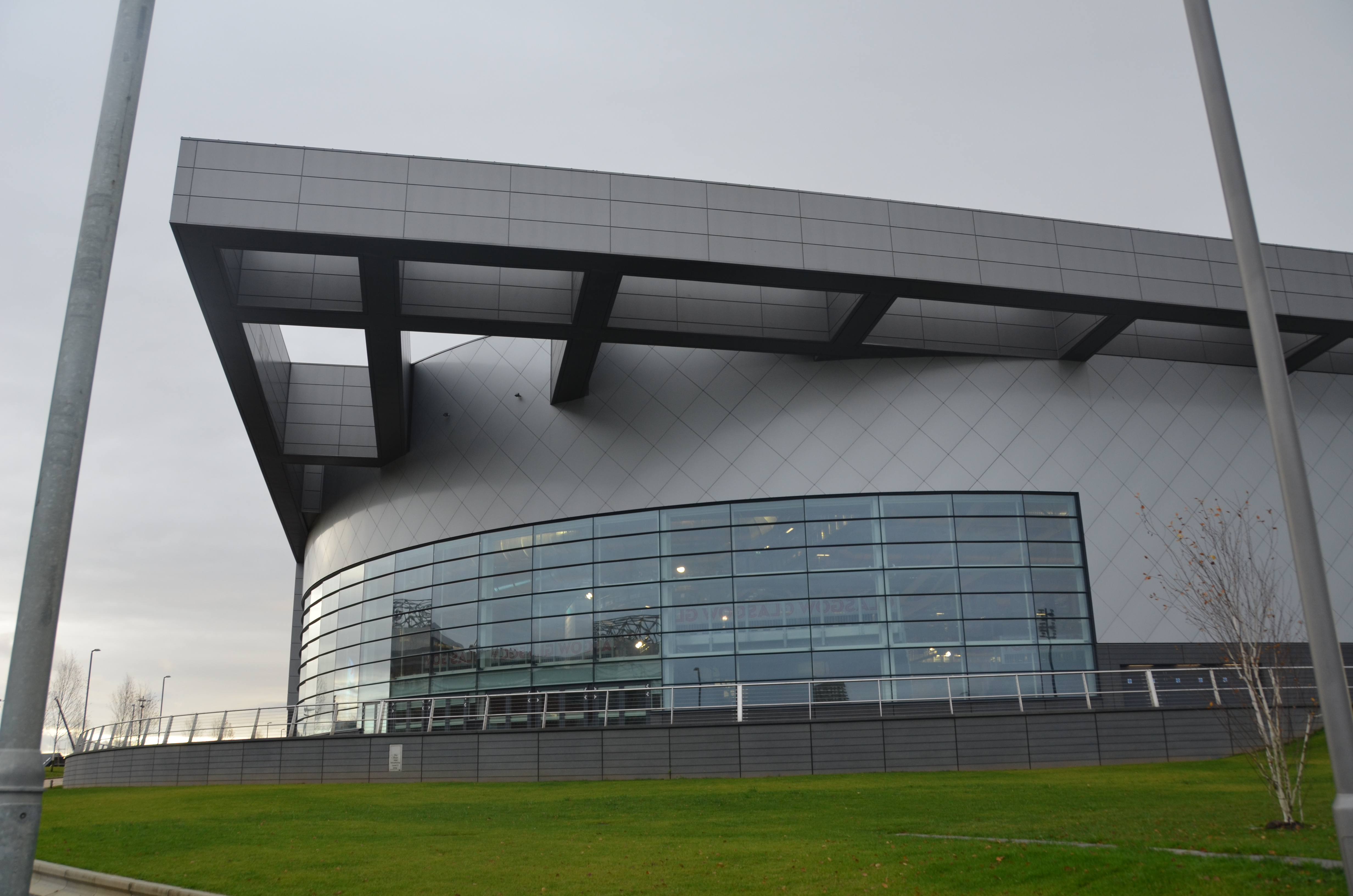 Sir Chris Hoy Velodrome, Bahnrad-Weltcup 2012